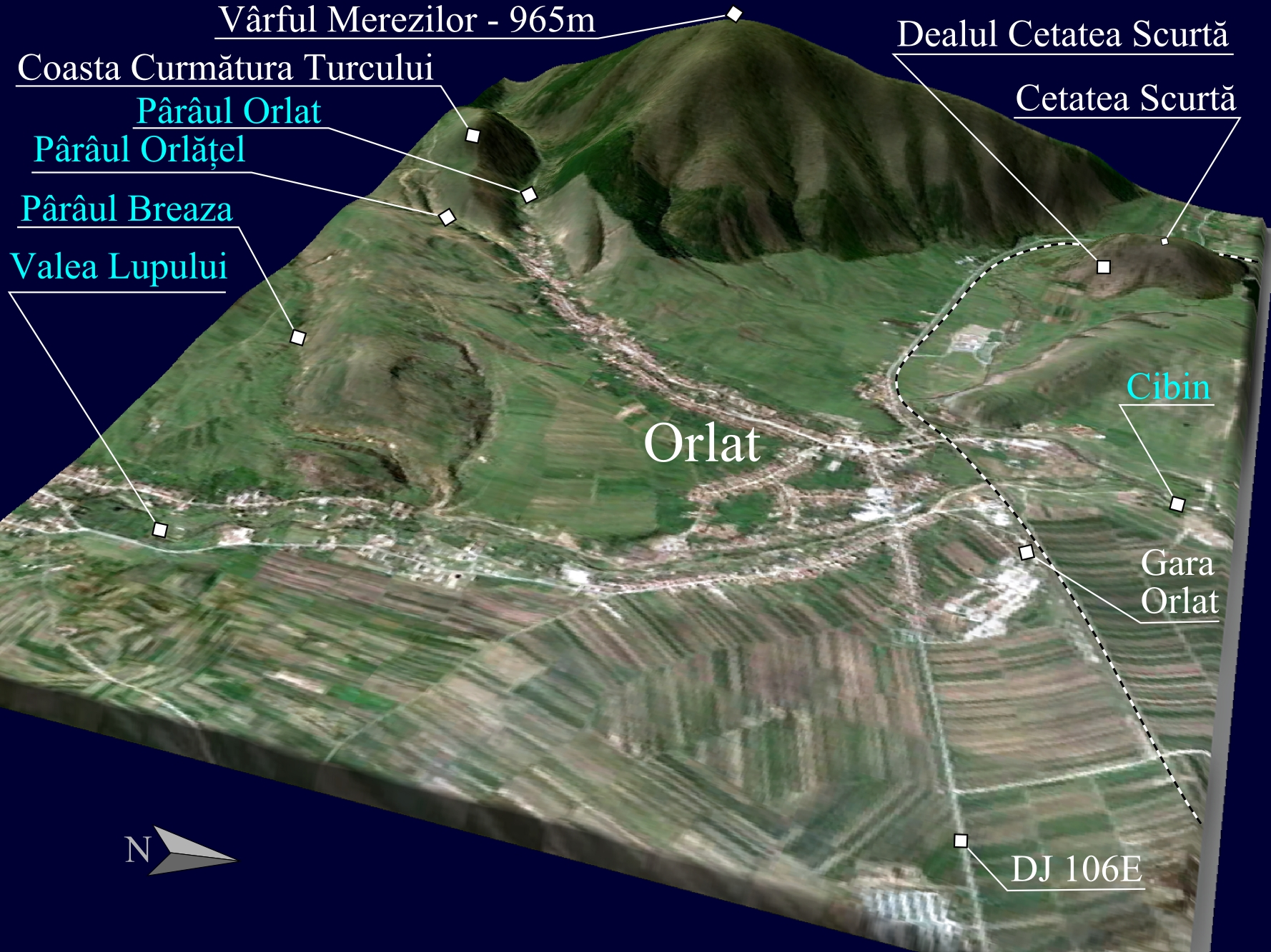 Prelucrare 3D pentru Orlat, Sibiu. Imagine realizata cu date SRTM furnizate liber de NASA si textura World Imagery.